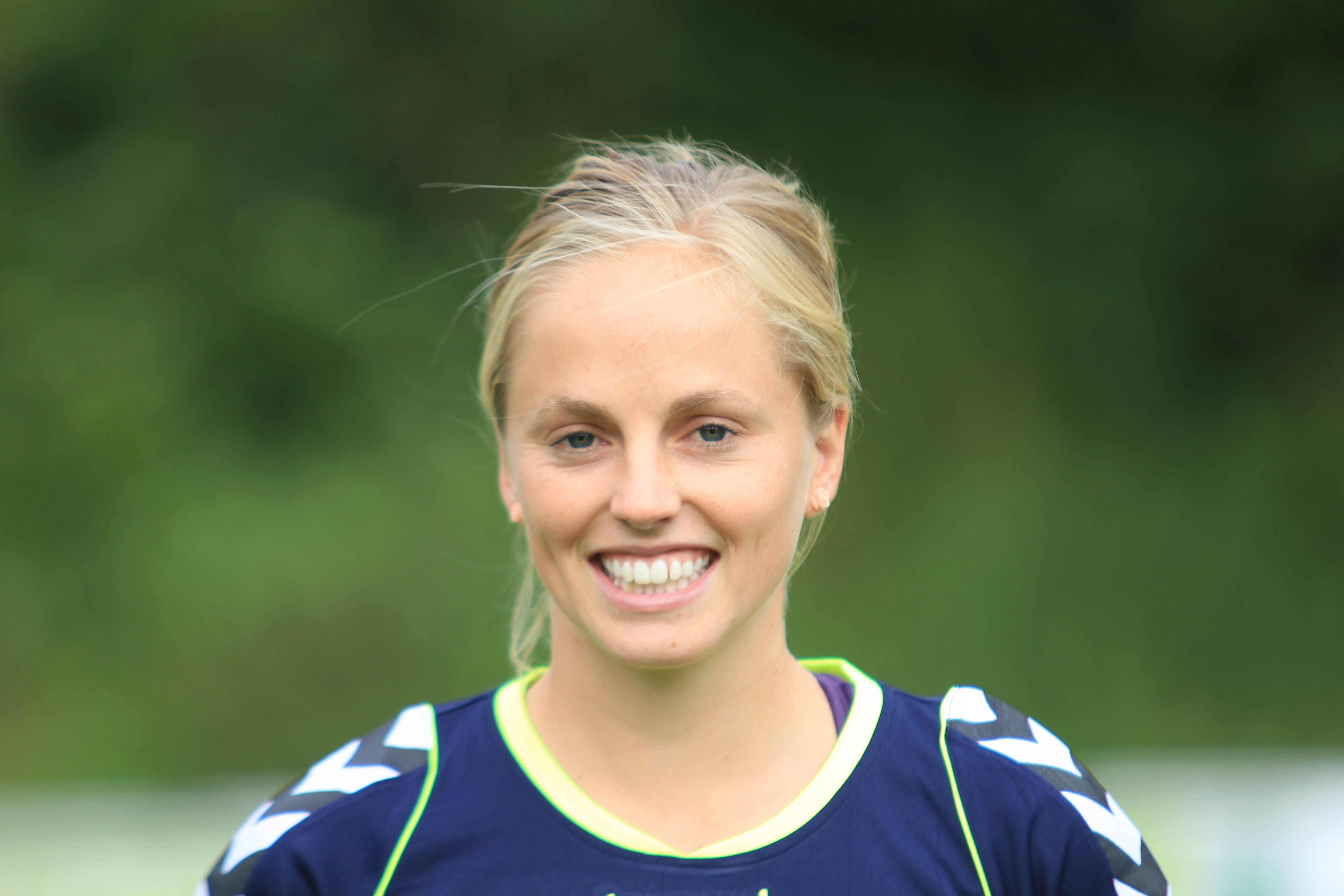 Elli Reed, FCR 2001 Duisburg